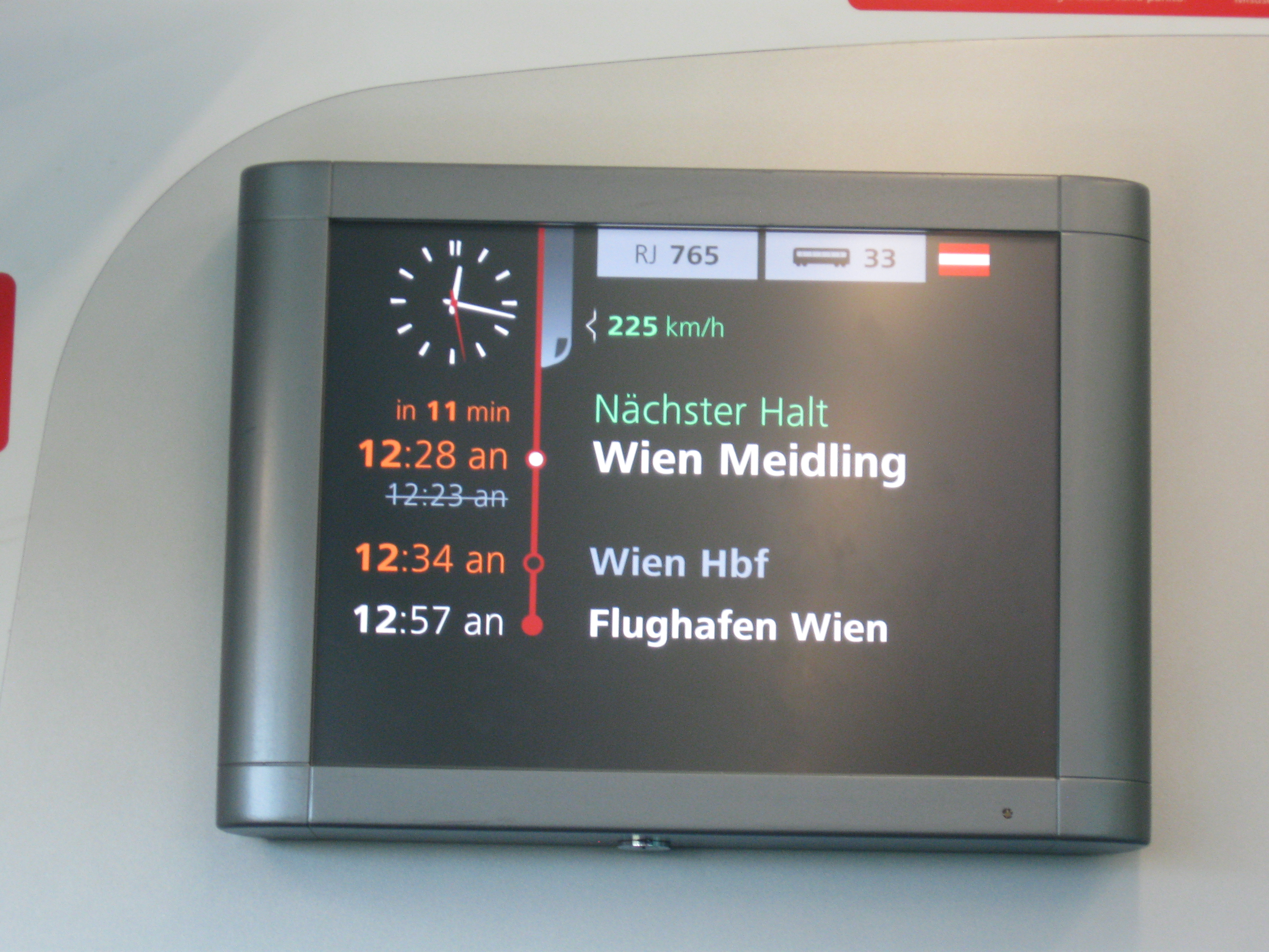 ÖBB-Railjet Fahrgastinformationssystem am 29. Juli 2016 zwischen St. Pölten Hauptbahnhof und Wien Meidling